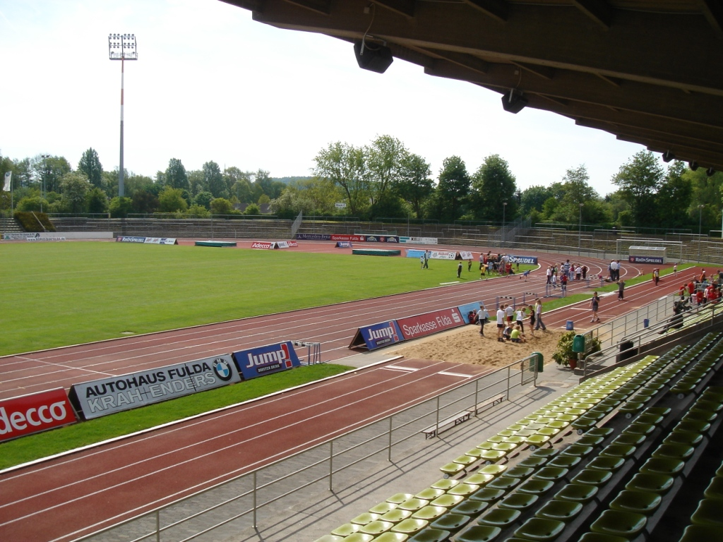 Ort: Fulda